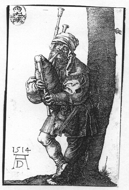 Der Dudelsackpfeifer, Kupferstich